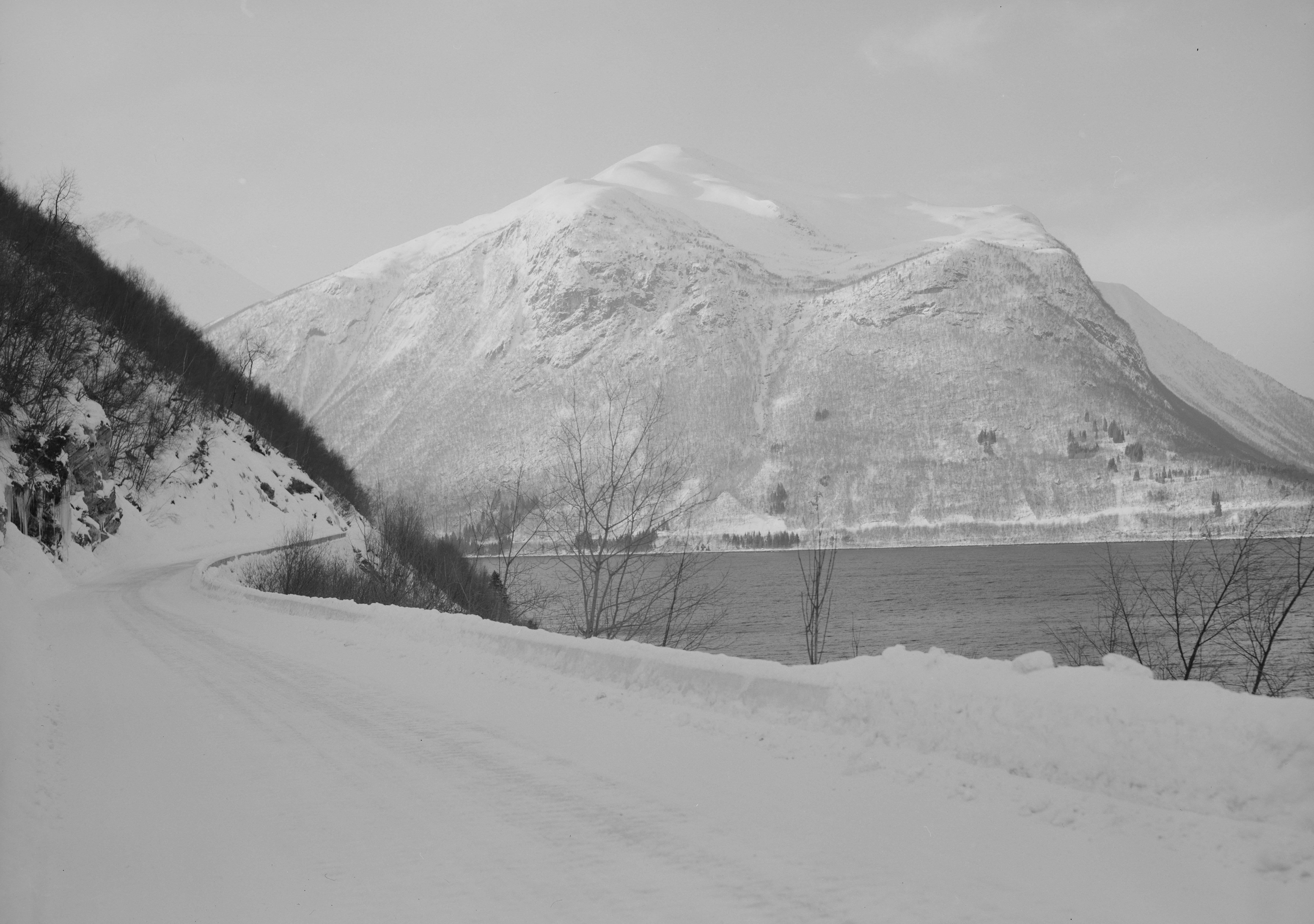 Bildet er hentet fra Nasjonalbibliotekets bildesamling. Anmerkninger til bildet var: Fotograf : G.S Innfjorden, Rauma, Møre og Romsdal